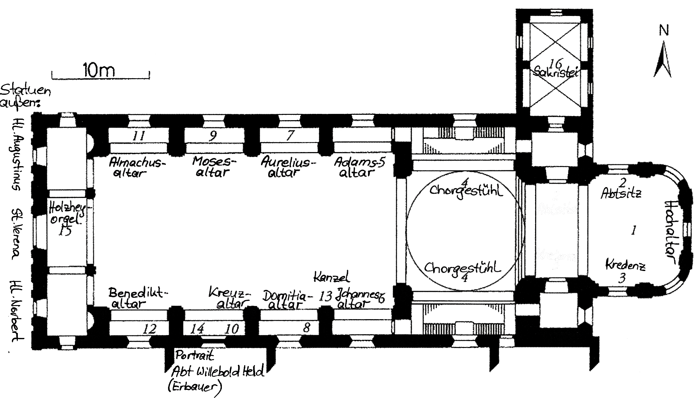 Grundrißplan St. Verena (Rot an der Rot) - aus Ekkehard Schmid: Pfarrkirche St. Verena - Ehemalige Abteikirche Rot an der Rot. Verlag Wilhelm Kienberger Lechbruck, 2007